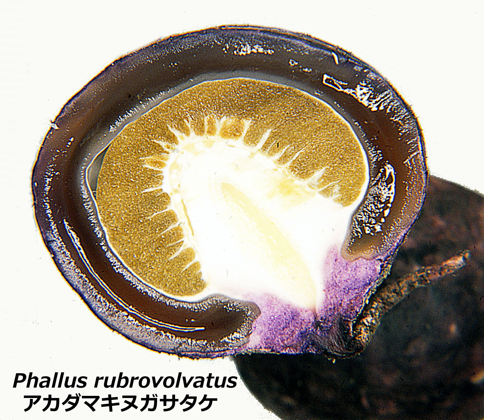 Section d'un oeuf montrant le stade embryonnaire du champignon.